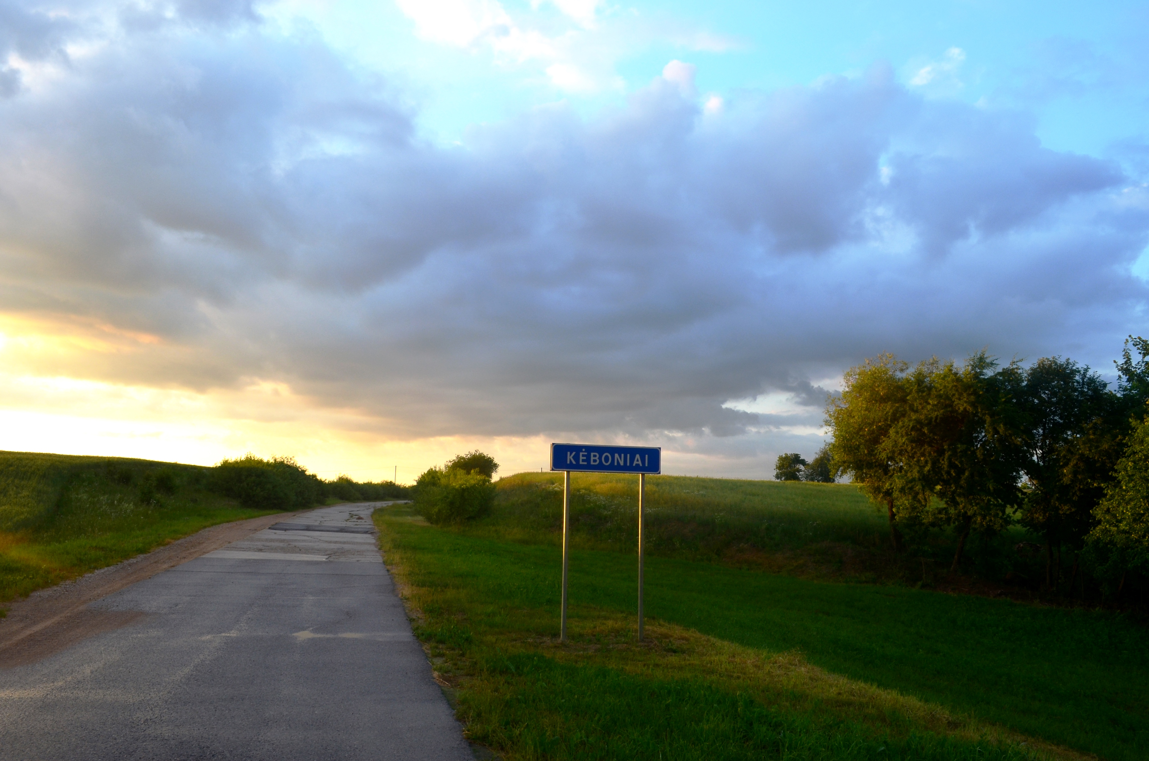 Kėboniai, Kėdainių raj.